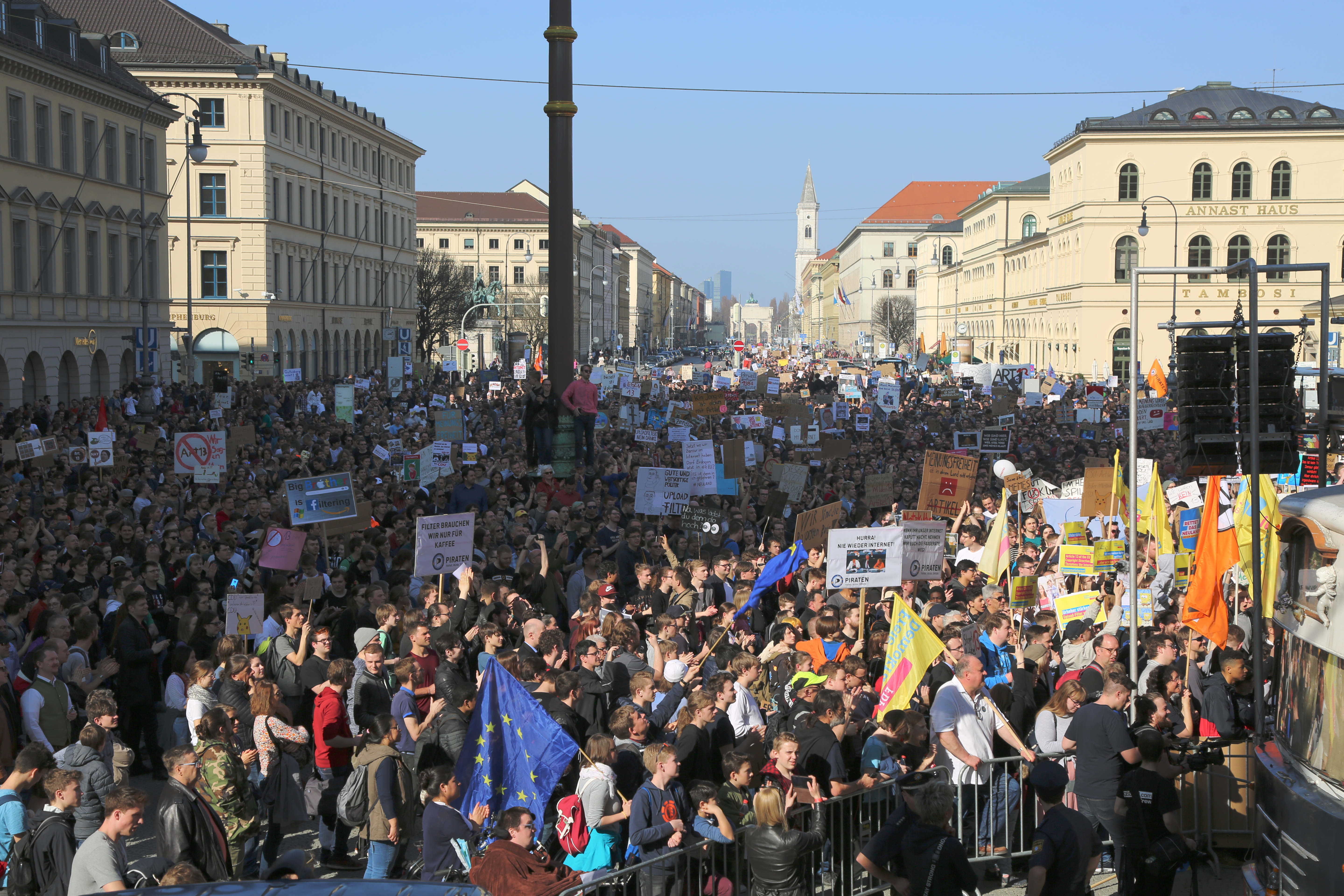 Save the internet Demonstration in München 2019-03-23